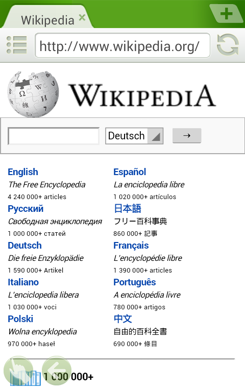 Screenshot vom Dolphin Browser Mini